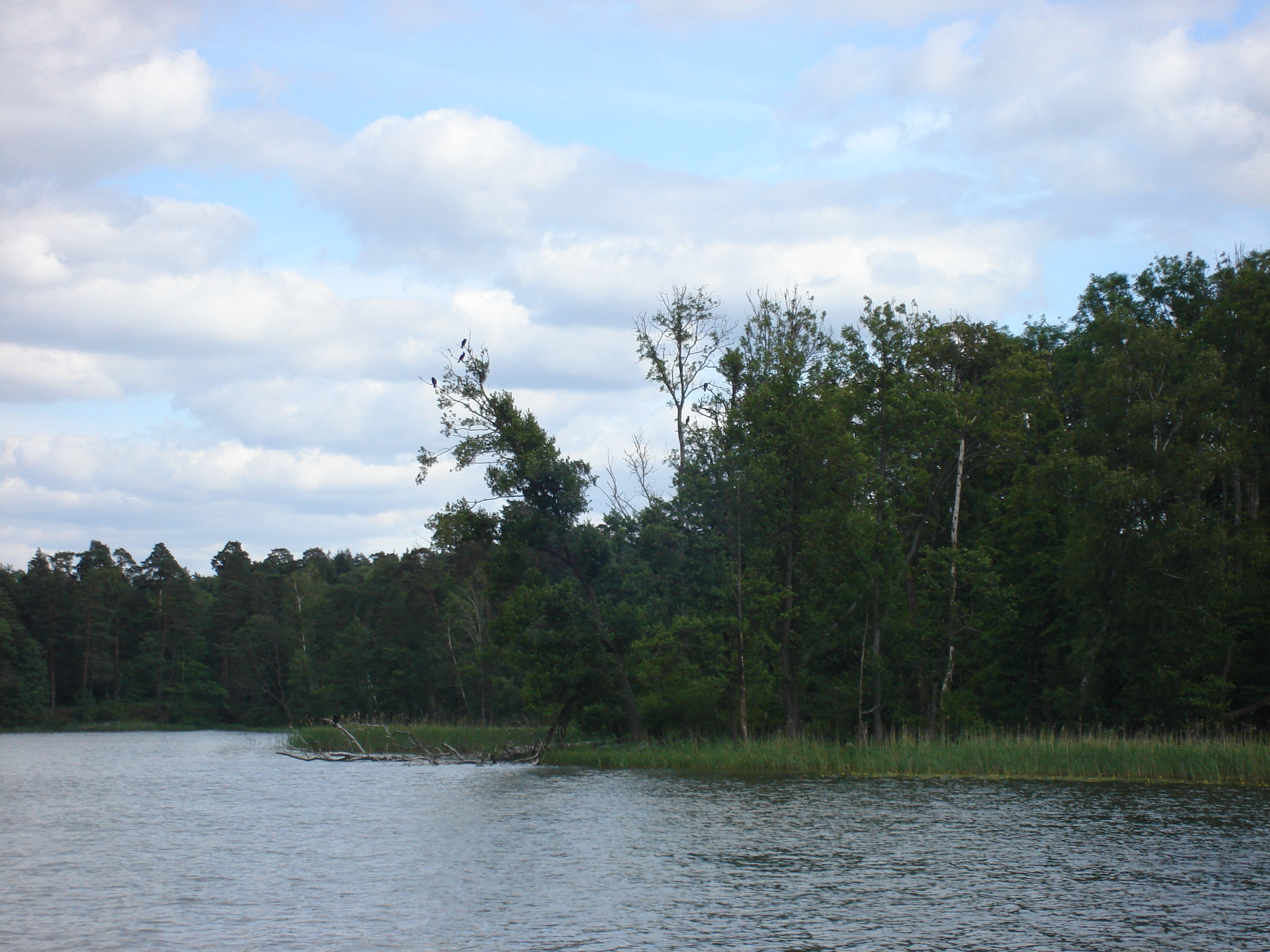 Jezioro Nidzkie. Kormorany na wyspie